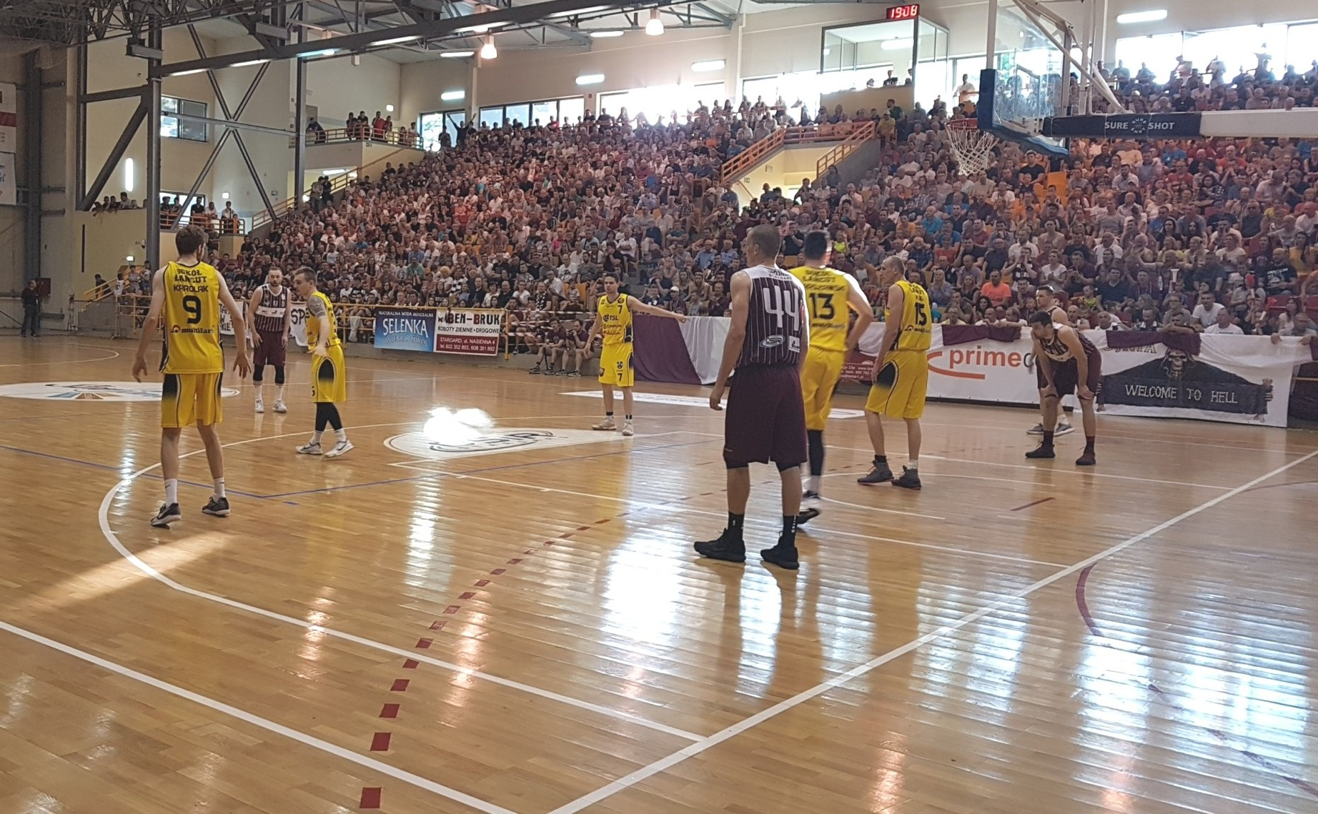 Finał. Spójnia Stargard i Sokół Łańcut (13.05.2018)